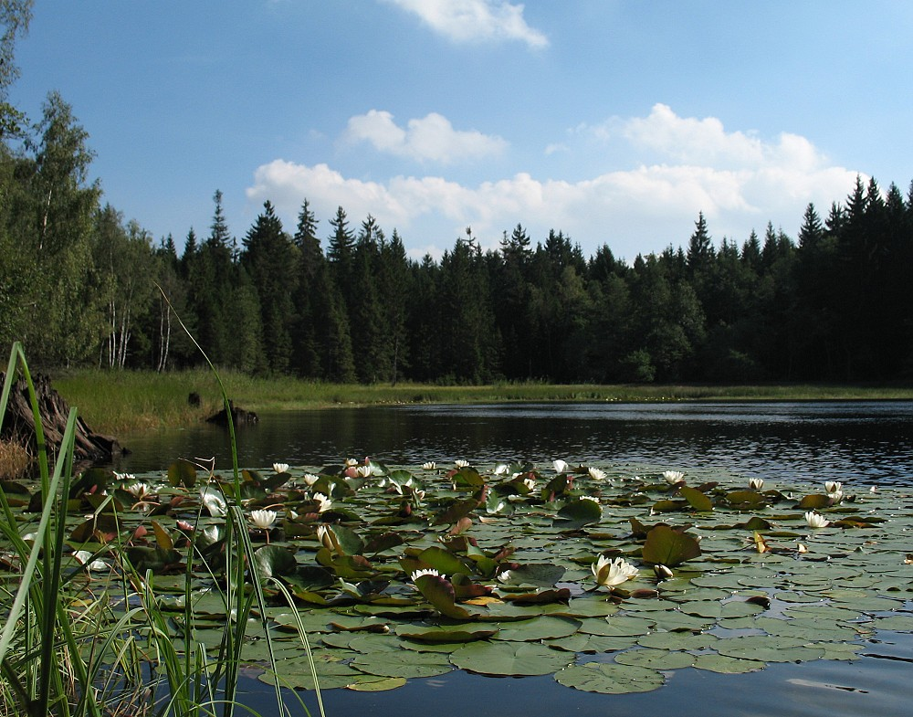 Lekníny na hladině Velkého Jedlovského rybníku